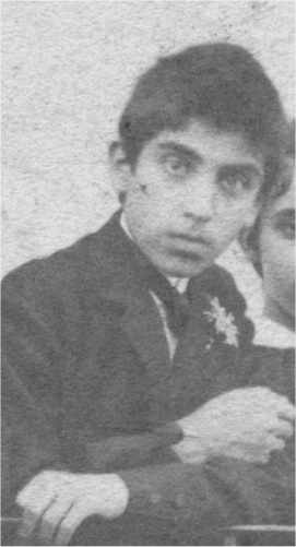 Fabio Massimo Majorana (1875-1934) padre di Ettore